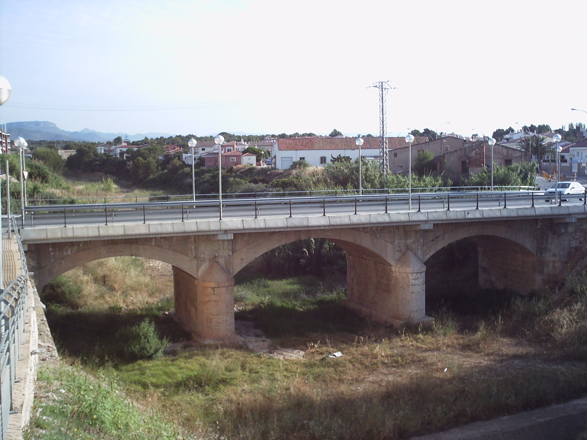 Riu de Llastres al seu pas per l'Hospitalet de l'Infant